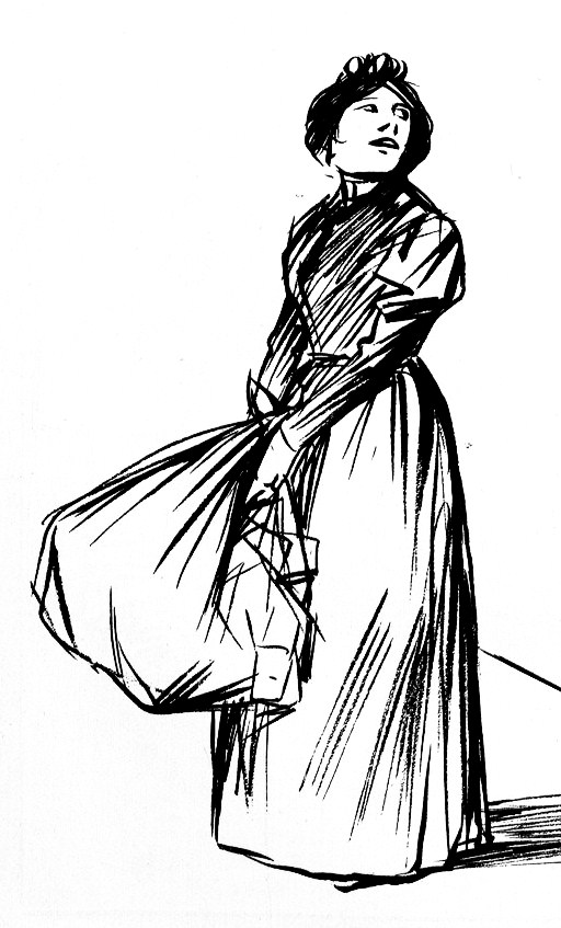 Blanchisseuse emportant le linge à laver. Détail d'un dessin politique paru dans la revue anti dreyfusarde Psst !.